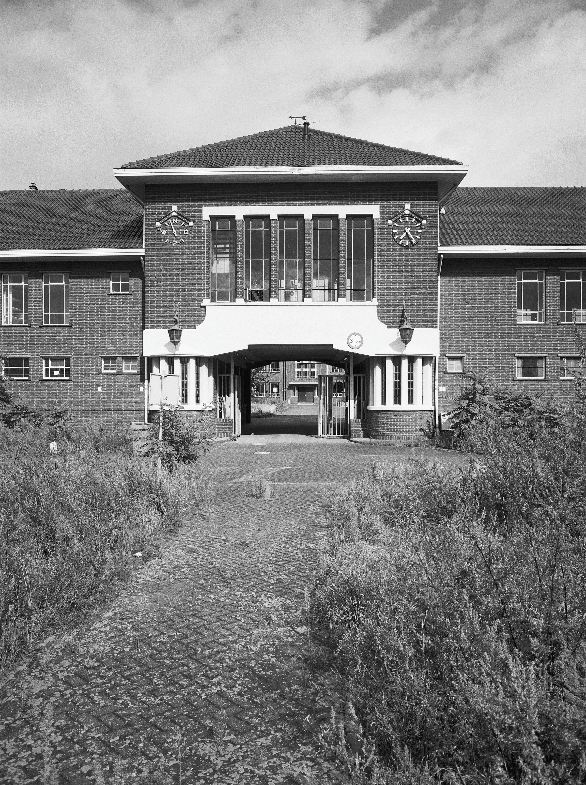 Ernst Casimir Kazerne: Exterieur kazerne, poort hoofdgebouw